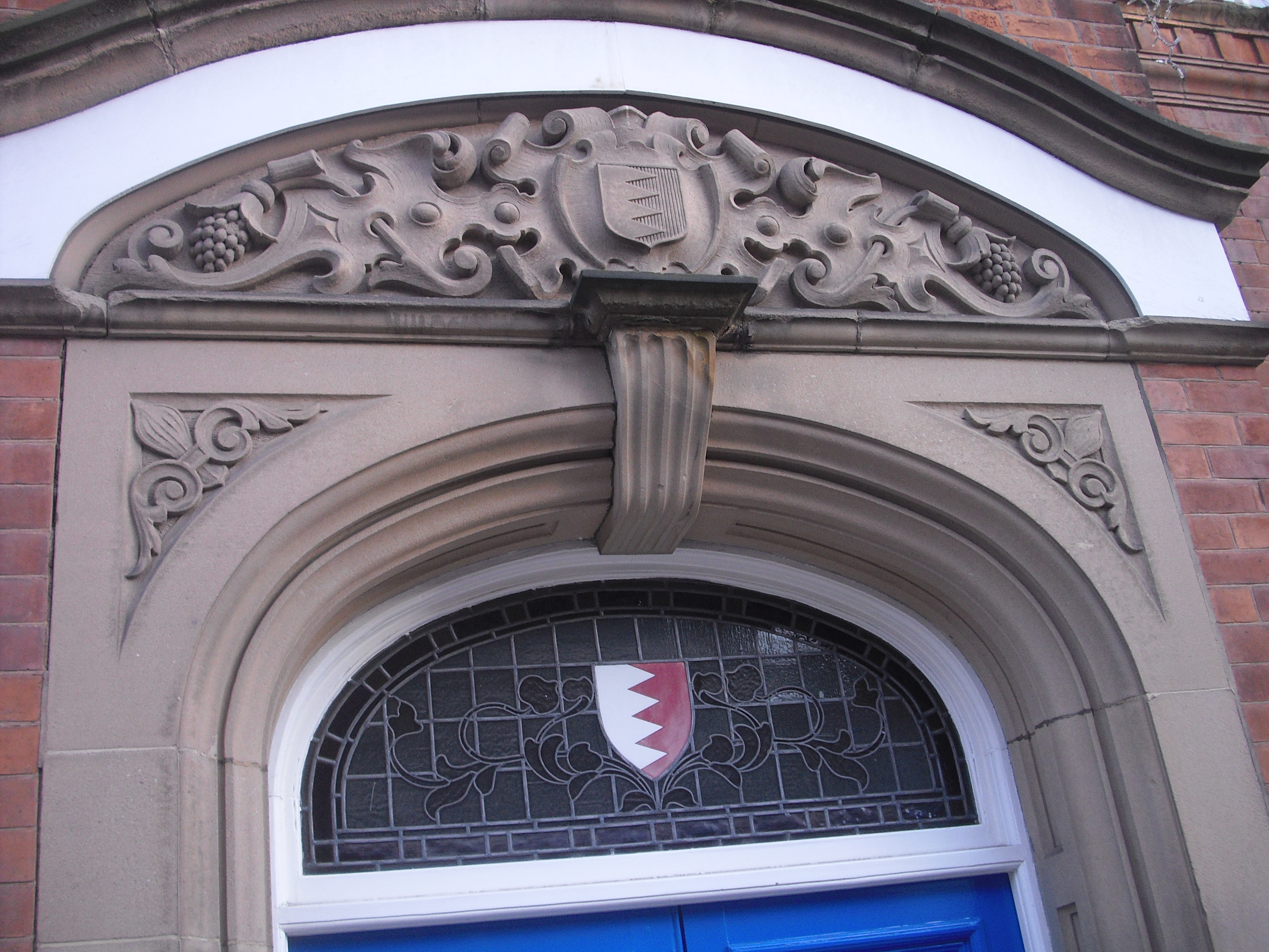 Herb Hinckley, Leicestershire. Arms: Party per pale indented argent and gules